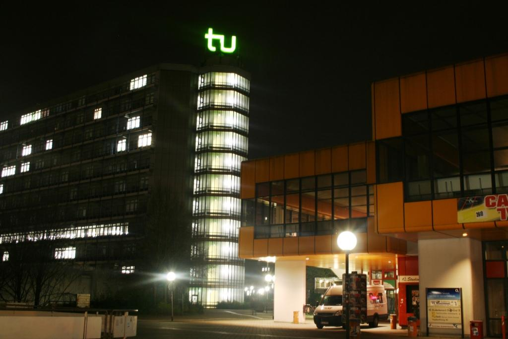 TU Dortmund, Mathetower, Mensagebäude bei Nacht